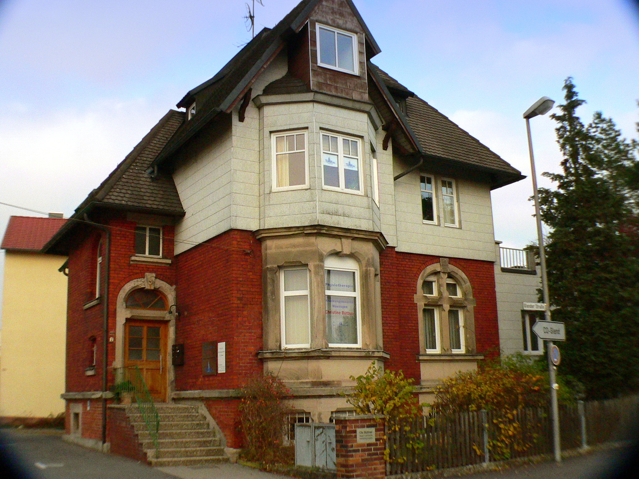 Coburg (Bayern), Glender Straße 2, Objekt unter Denkmalschutz